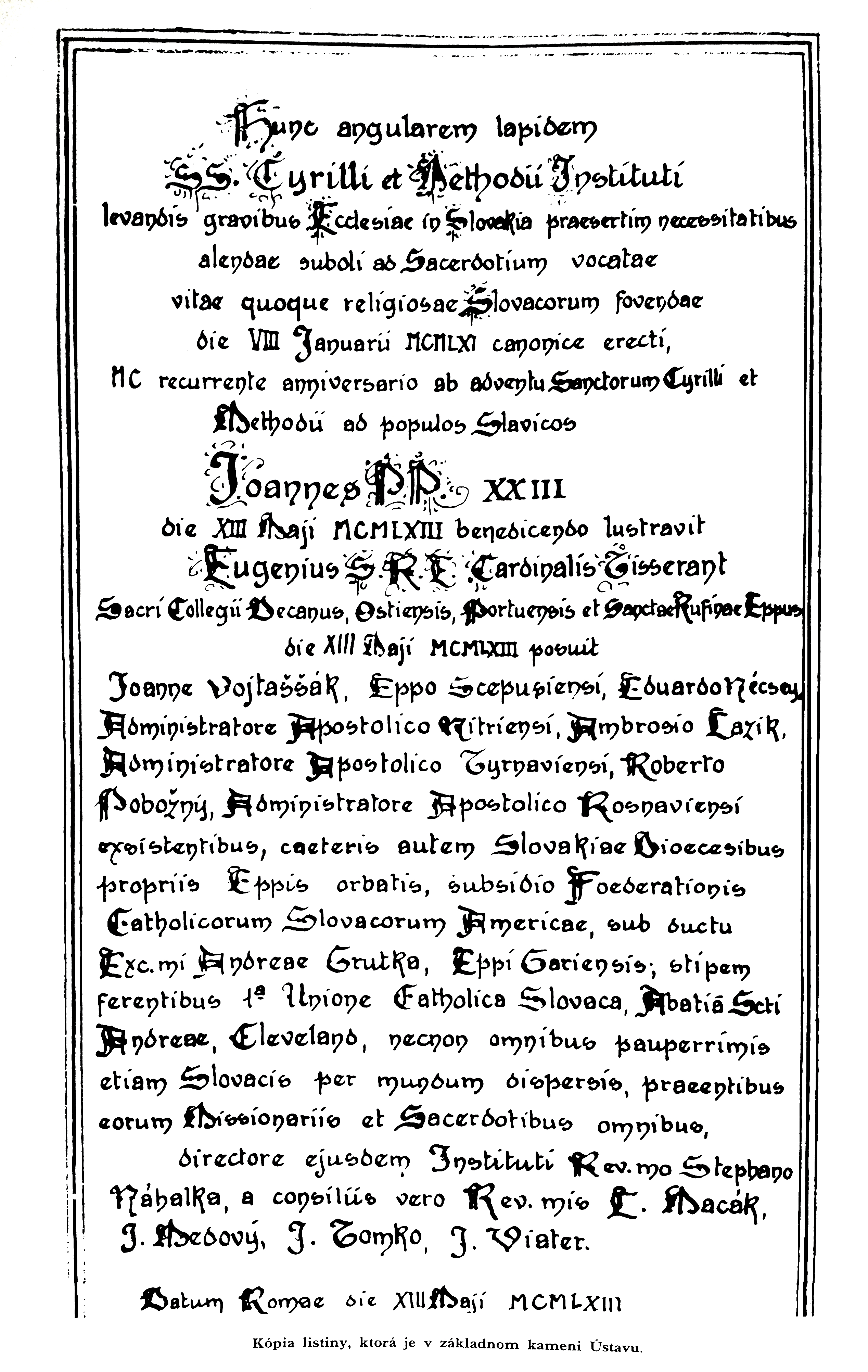 Pietra angolare Pont. Ist. SS. Cirillo e Metodio - Roma